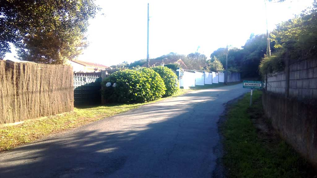 Vista de Rachabordos, Fene.